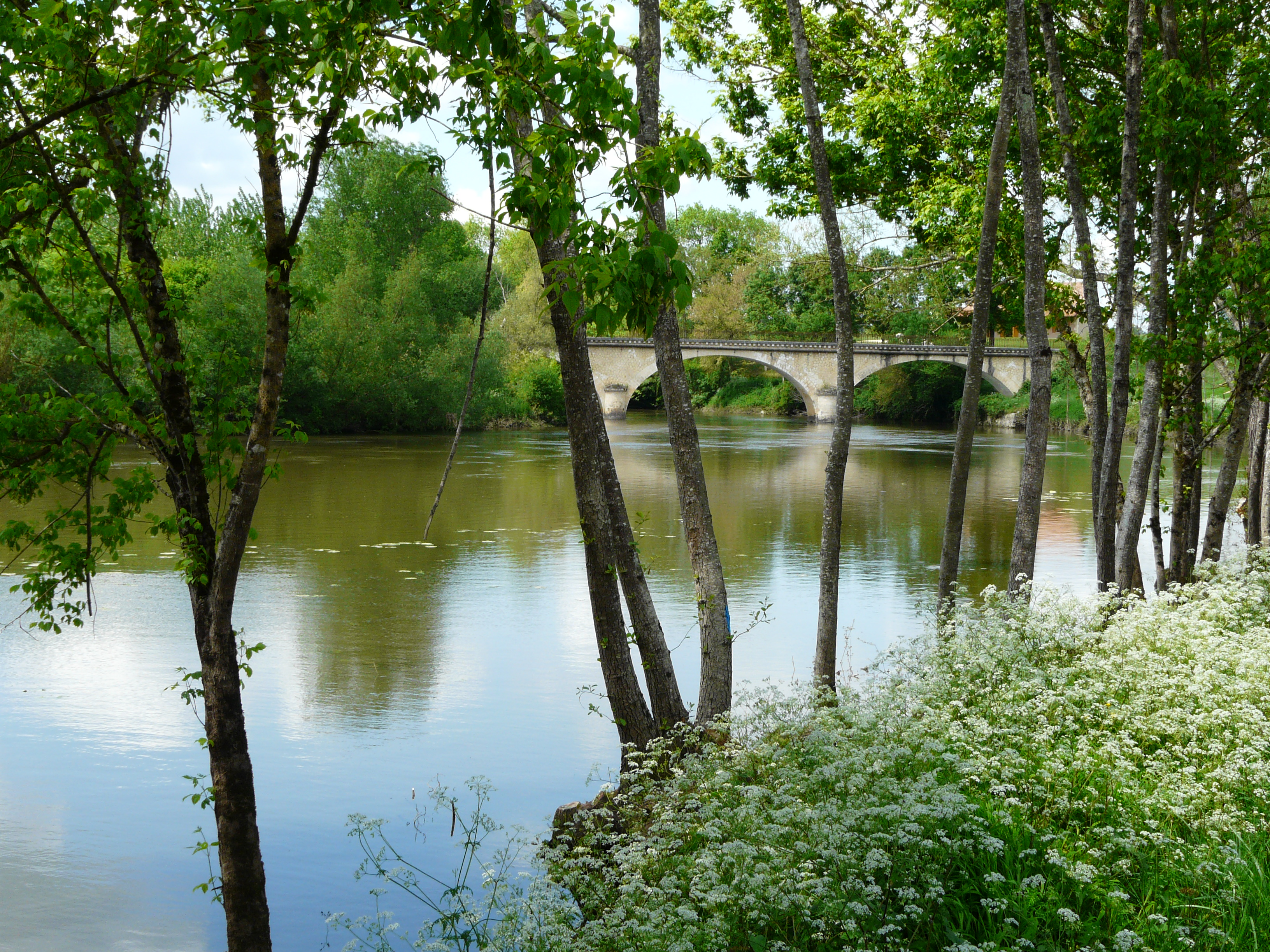 L'Isle au pont de la route départementale 3E4 entre Bénévent et Saint-Laurent-des-Hommes, Dordogne, France